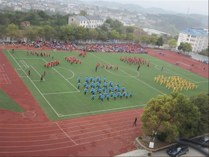 一所学校的巴山舞比赛 (A school dance competition, BaShan. Richard Avery (talk) 15:18, 14 August 2014 (UTC)